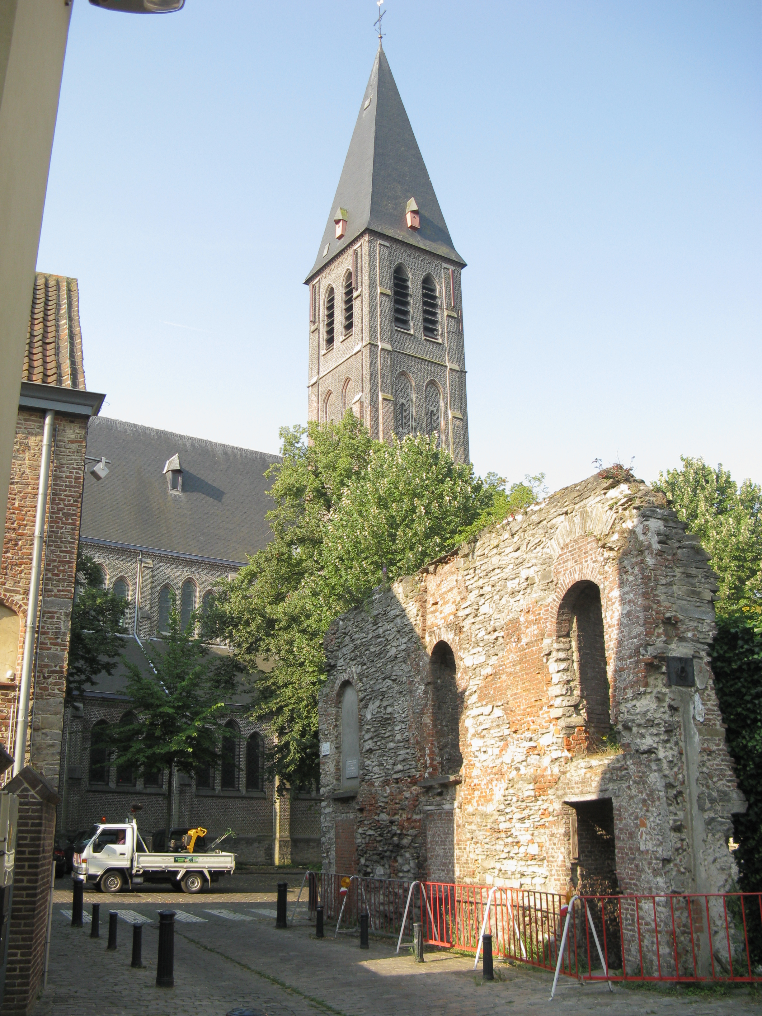 Sint-Machariuskerk, Gent, vanuit Buitenhof